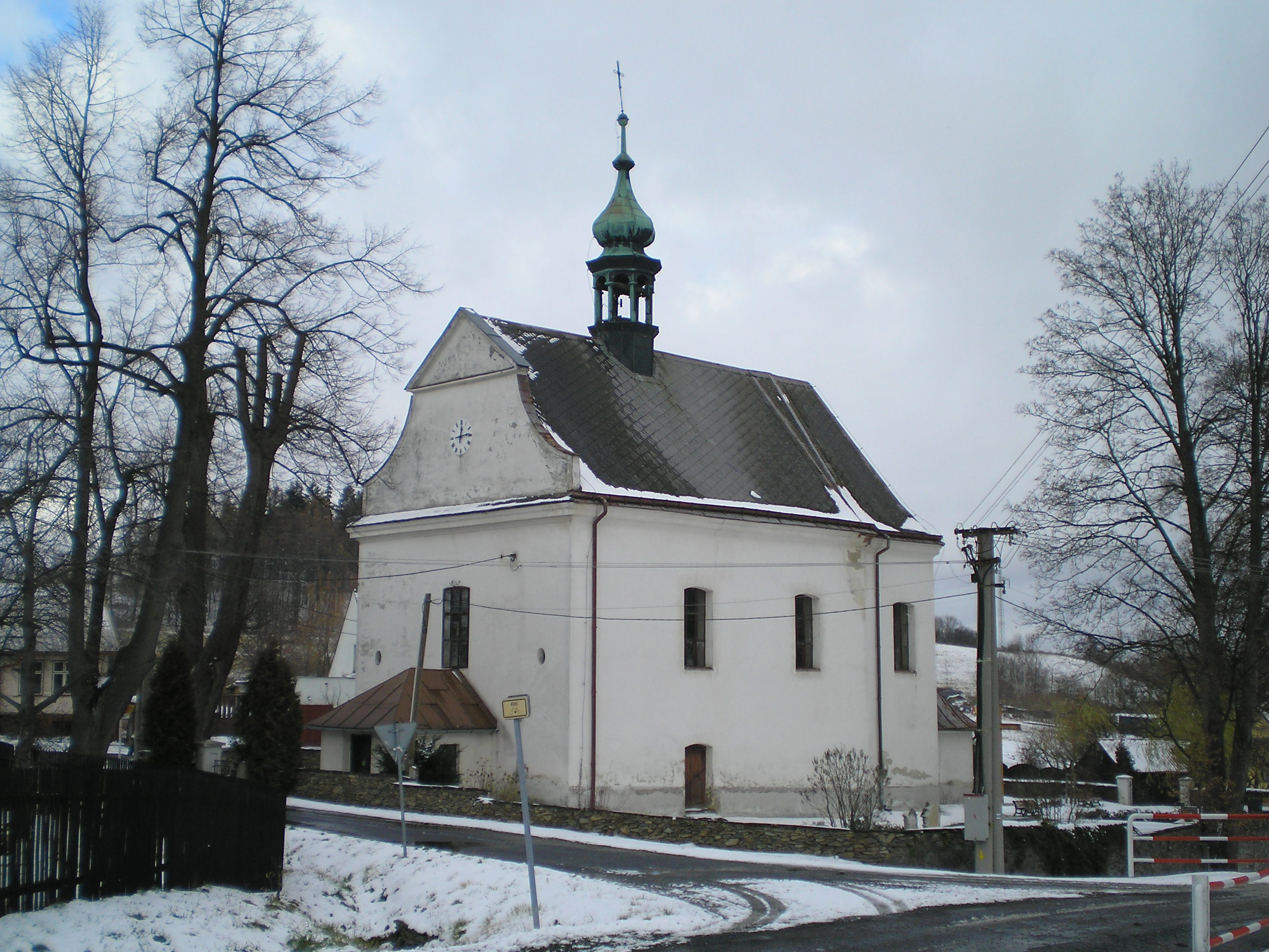 Mezina, kostel Nejsvětější Trojice